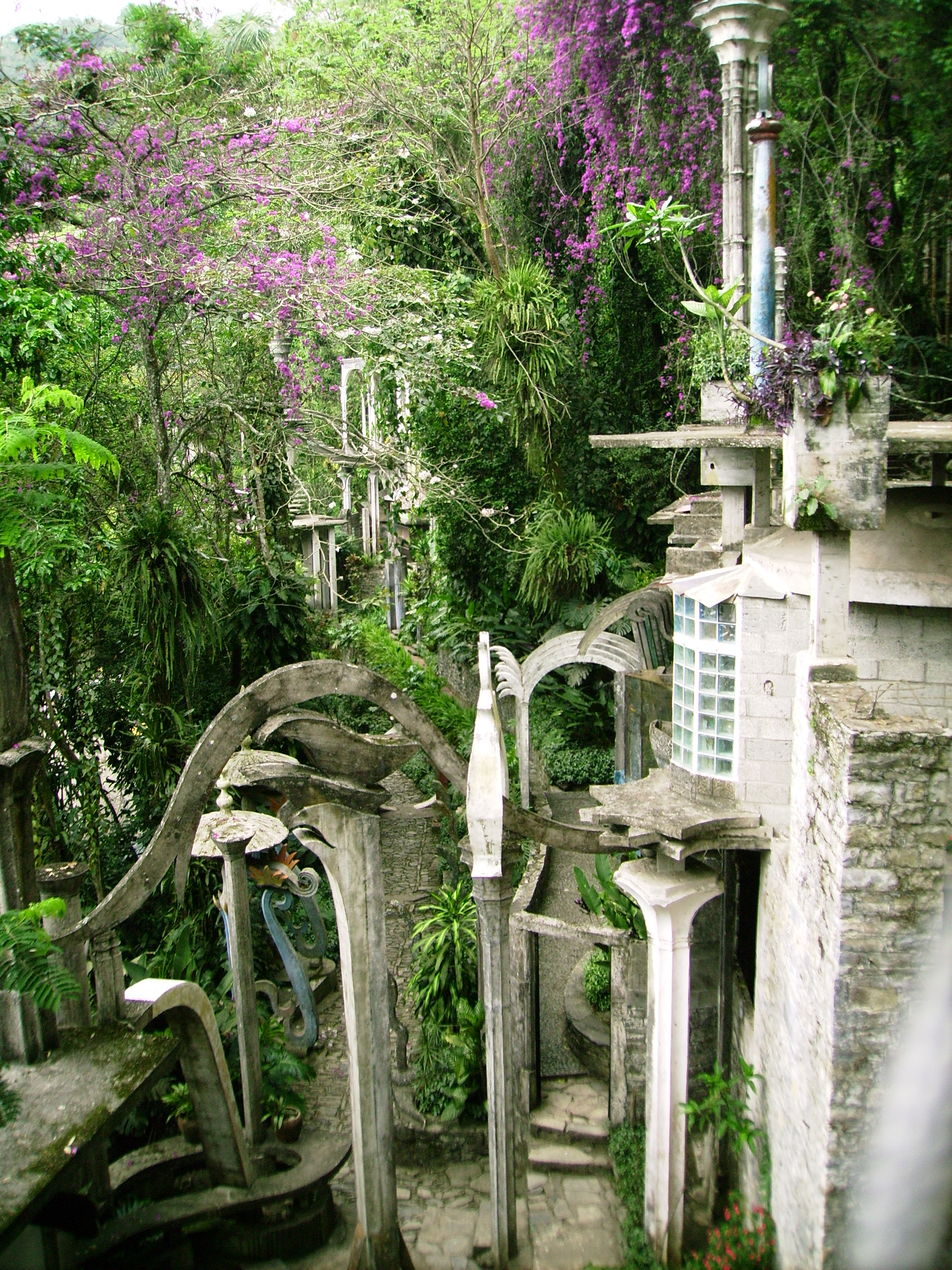 Sir Edward James' surrealist garden, Las Pozas, Xilitla, Mexico